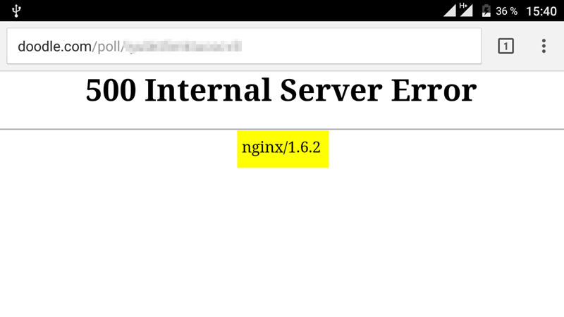 Fehlermeldung des Dienstes Doodle mit Signatur der Web-Server Software nginx